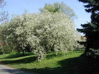 Prunus mahalebDansk: Weichsel